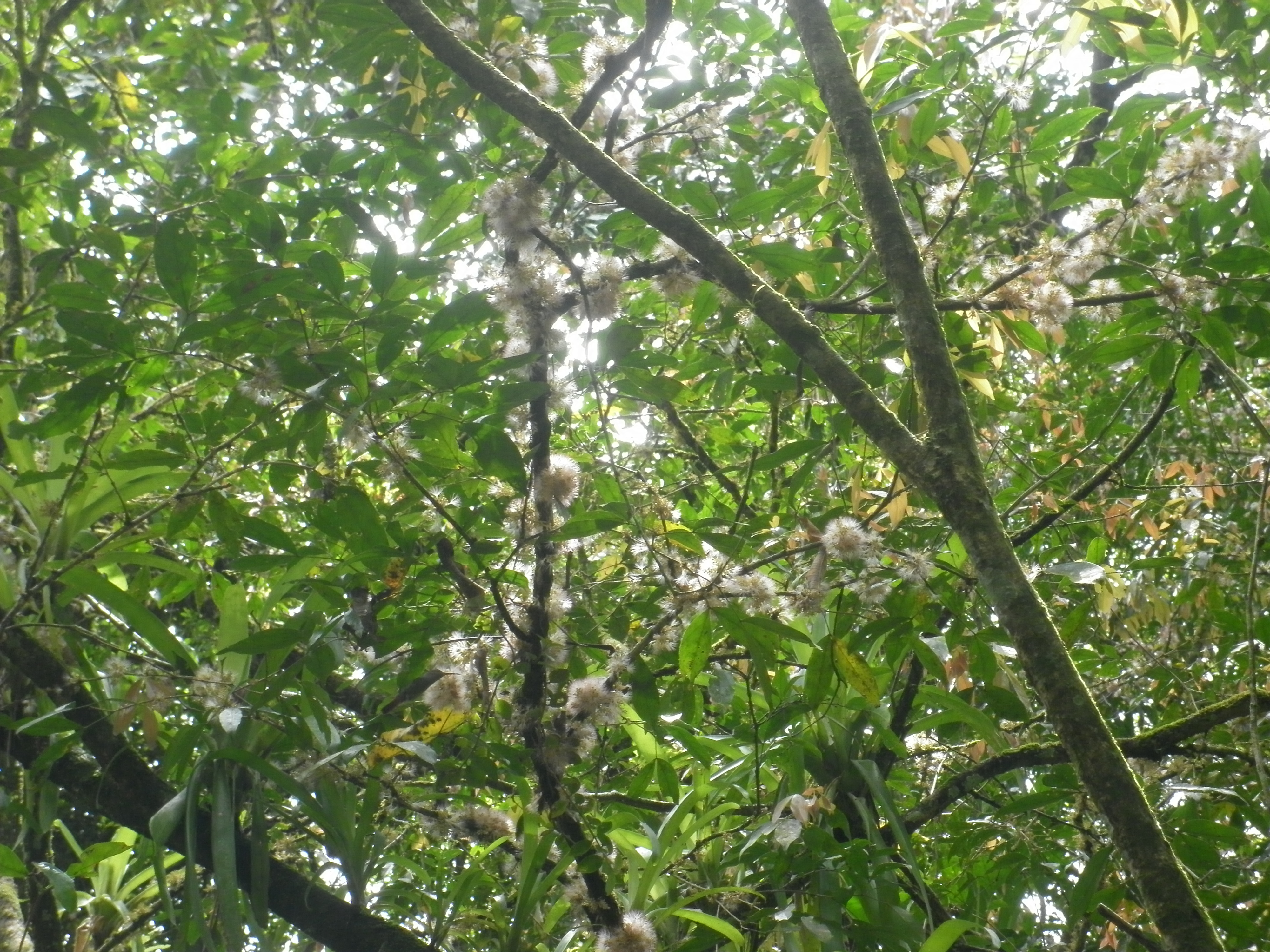 Quebrada Camaron, santa marta, Bugaba, Chiriquí, Panamá